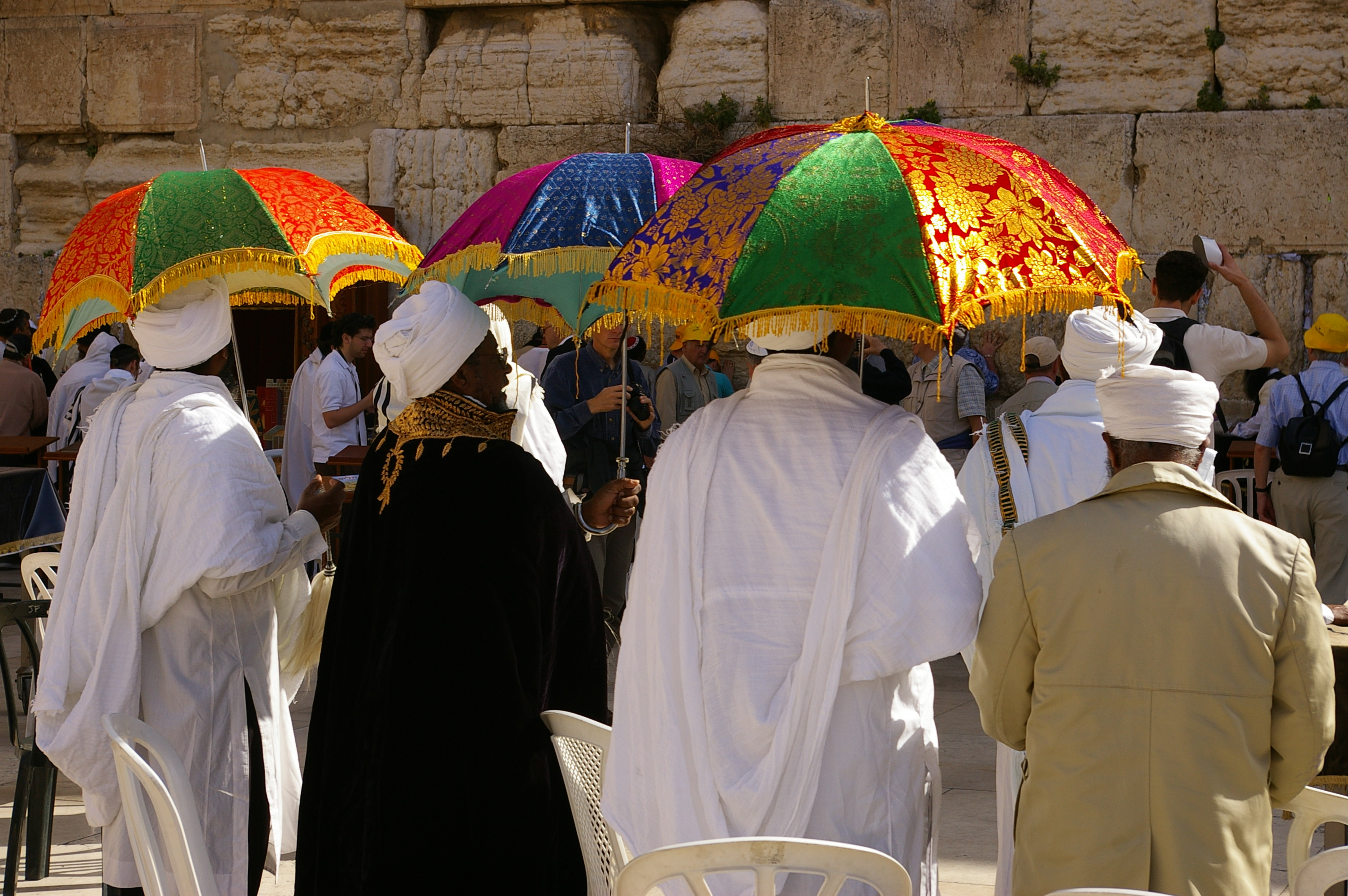 Juifs d'Ethiopie au Kotel